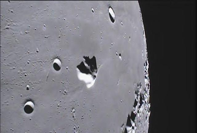 Foto de la superficie lunar tomada por la sonda Ebb